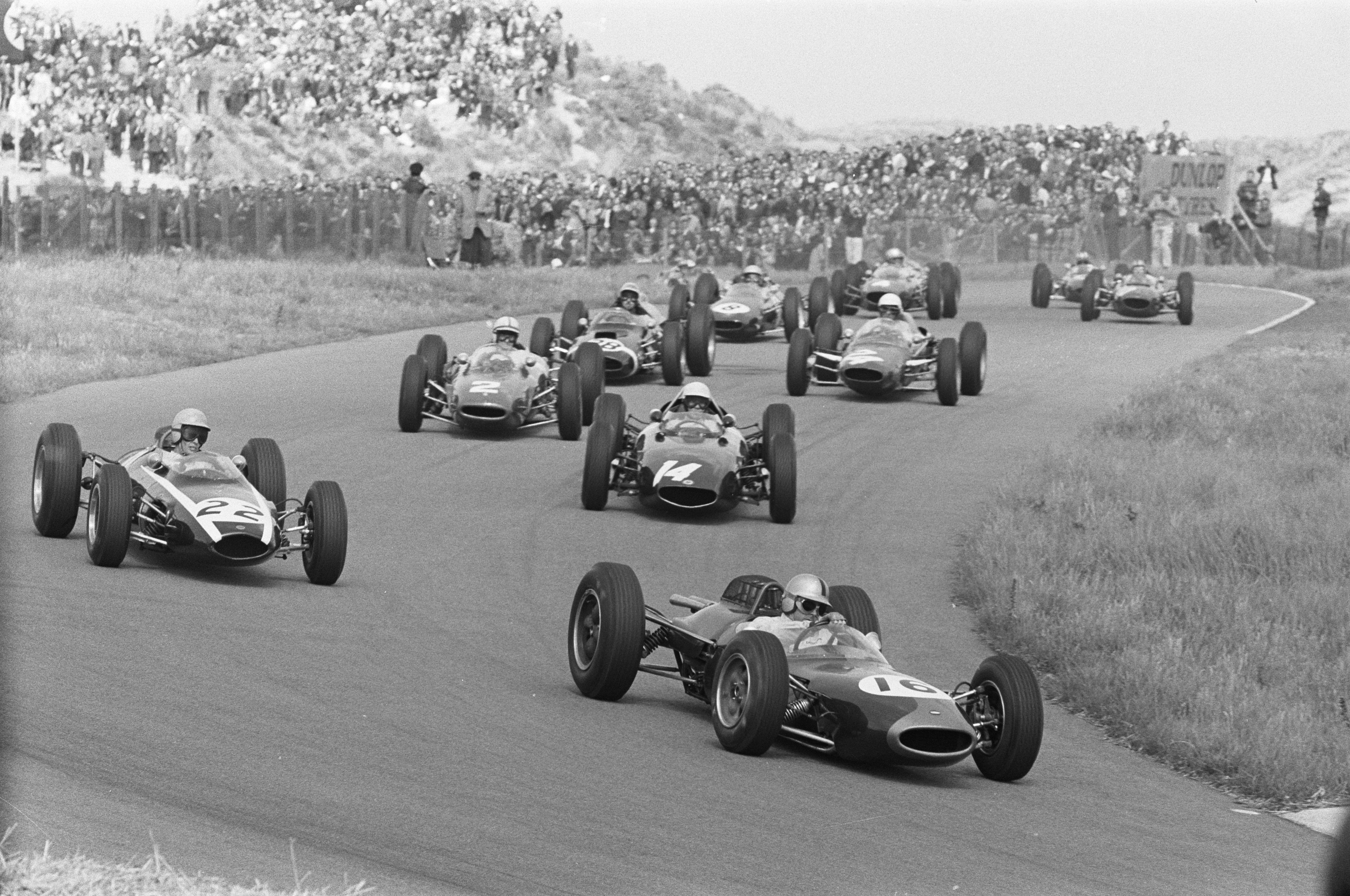 Grand Prix te Zandvoort. Het rennersveld. Nummer 16 Jack Brabham, nummer 22 Tony Maggs, nummer 14 Richie Ginther, nummer 2 John Surtees.